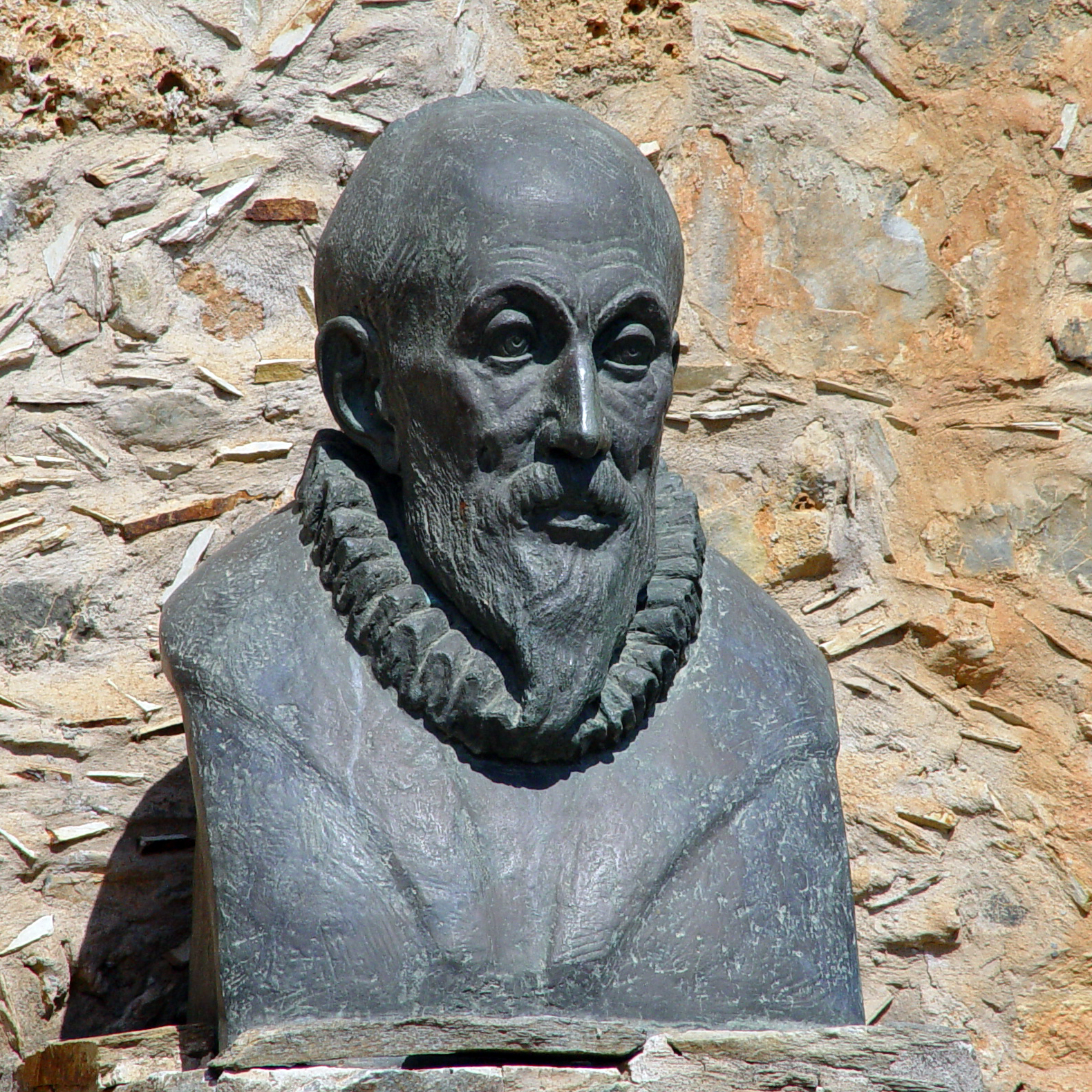 El Greco, Fodele, Crete, Greece